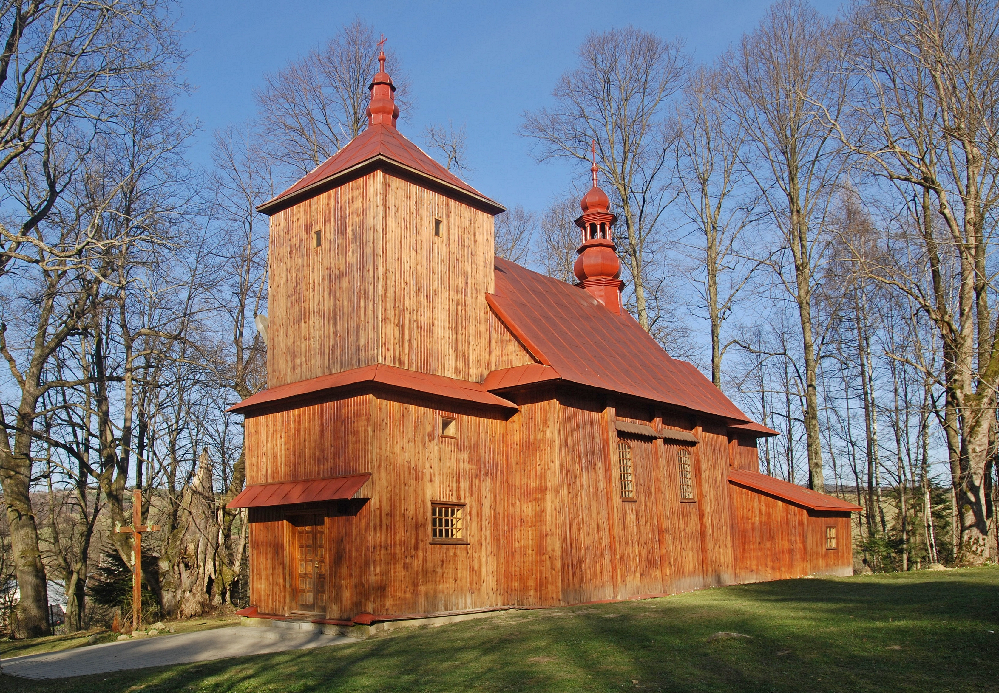 wieś Paszowa, zespół cerkwi gr.-kat. Narodzenia NMP, ob. kościół rzym.-kat. Wikidata has entry Q30533352 with data related to this item.